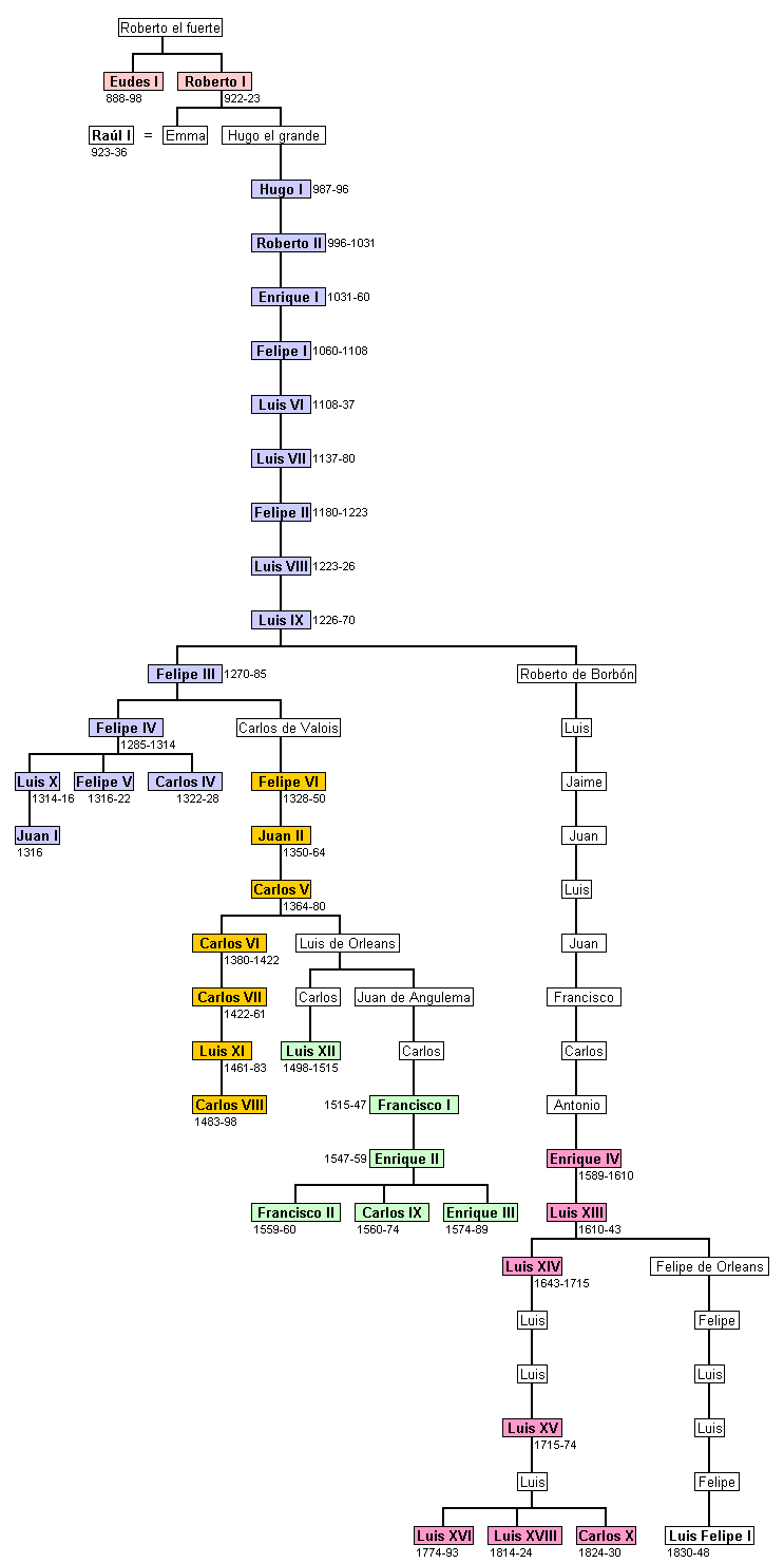 Árbol genealógico de los reyes de Francia de la casa de los Capetos, tanto directos como de las casas de Valois, Valois-Orleans, Valois-Angulema, Borbón y Orleans, así como sus antecesores Robertinos